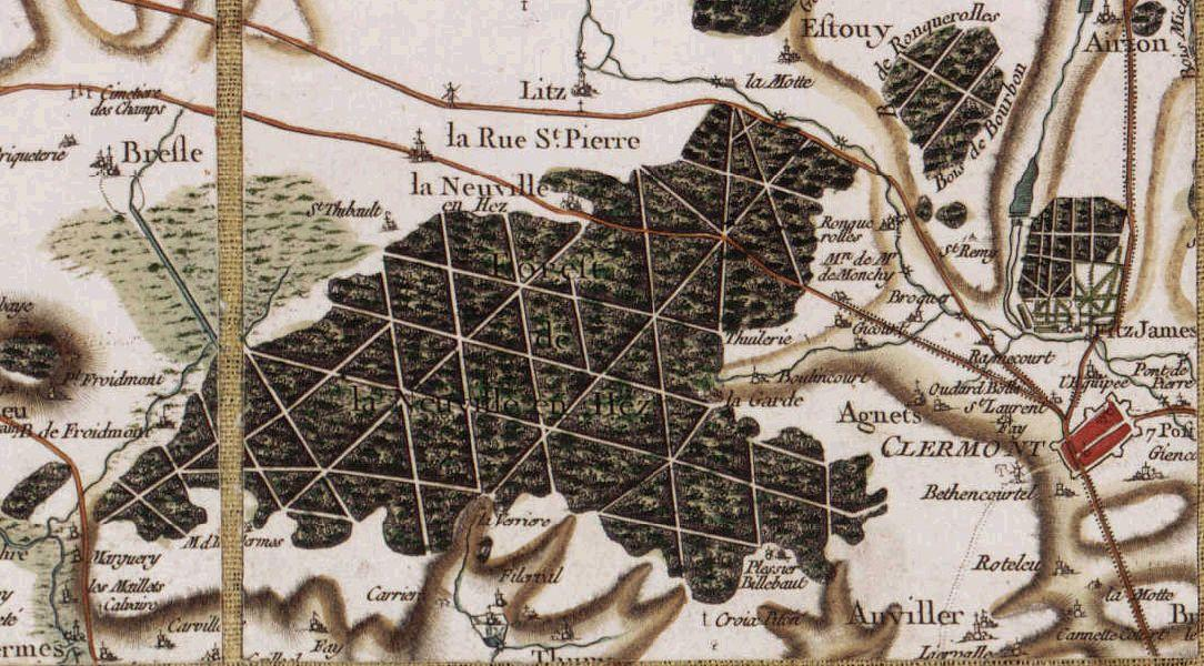 Foret de Hez-Froidmont, carte de cassini